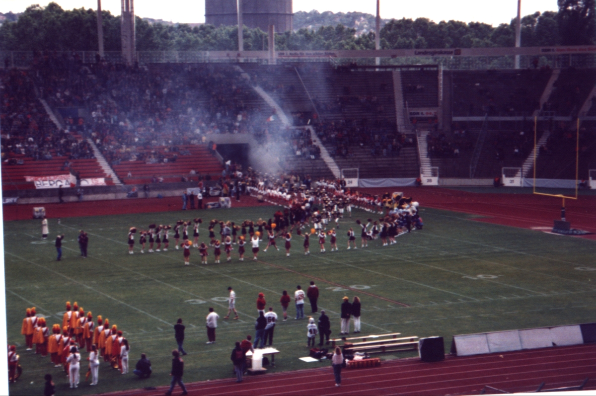 Einlauf der Bergamo Lions beim Eurobowlfinale, Stuttgart (Germany), 1994